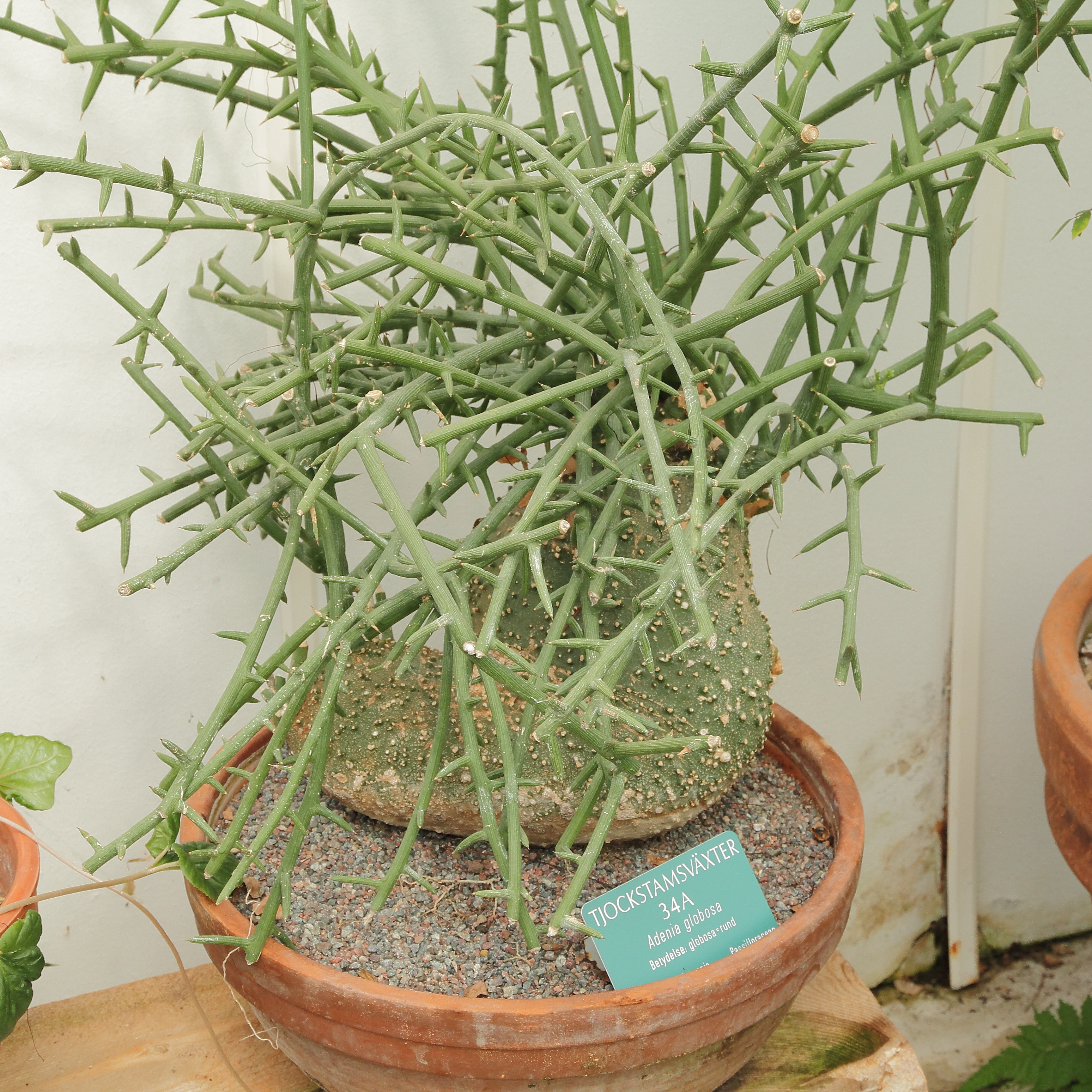 Adenia globosa i Bergianska trädgården